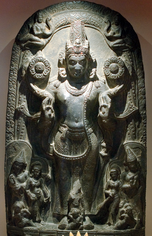 Surya-Beeldje (6137-1) Suryabeeldje